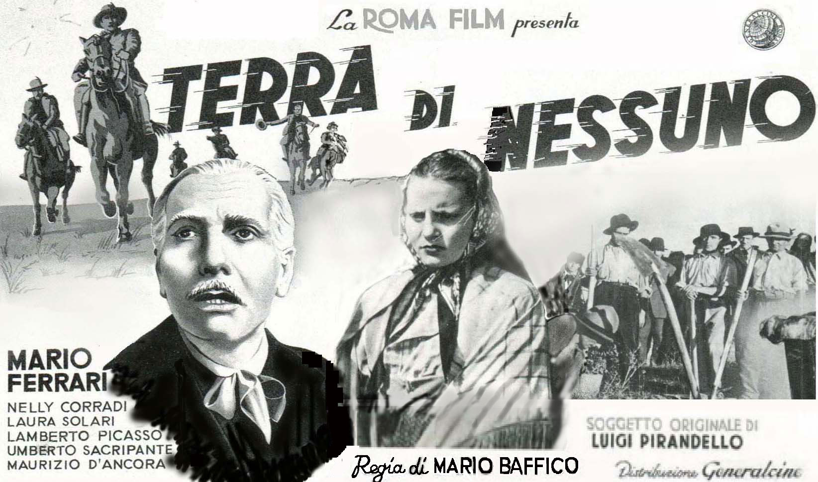 Terra di nessuno /(Baffico, 1939) - promo